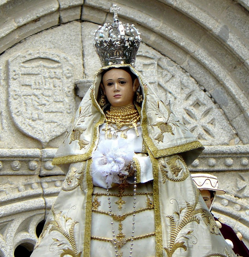 Nuestra Señora de la Encina saliendo de la Iglesia Parroquial de Macotera seguido de San Roque. Día 16 de agosto de 2009.